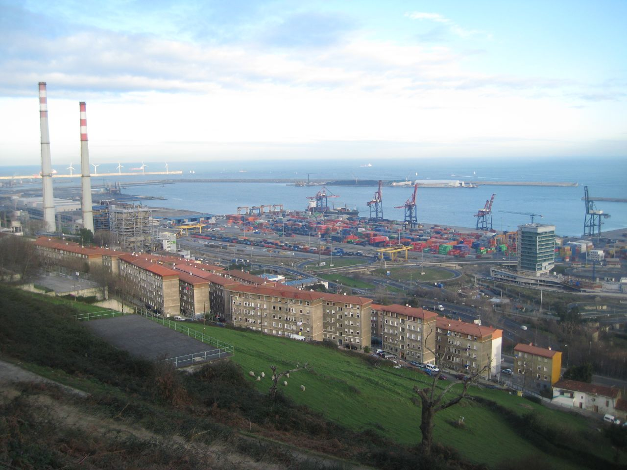 Santurtziko San Juan de Regales auzoa.